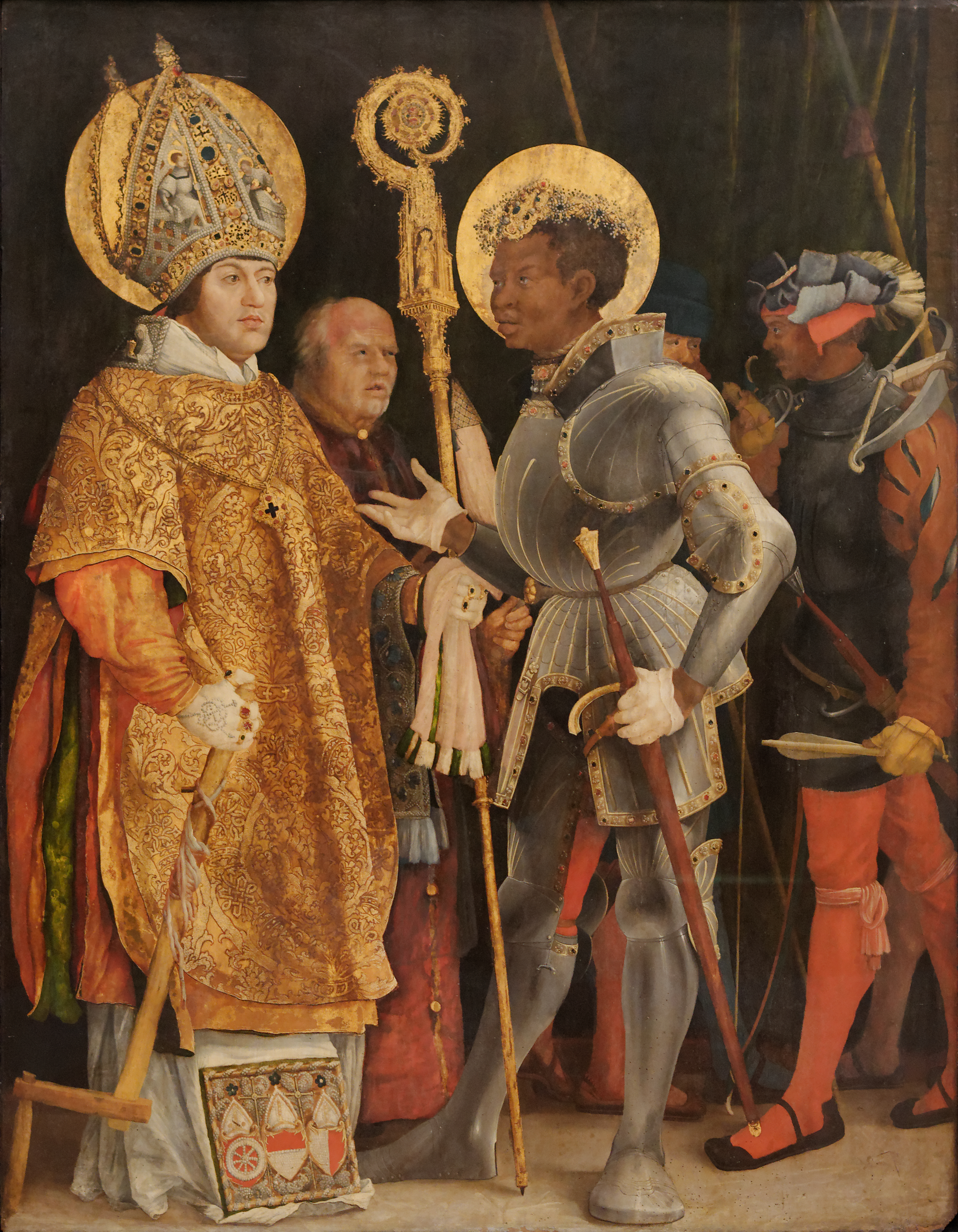 Begegnung des hl. Märtyrers Mauritius, des Anführers der thebaischen Legion, mit dem hl. Erasmus. Der hl. Mauritius war Patron des Stiftes und des Heiligen Römischen Reiches, der hl. Erasmus Patron des fürstlichen Hauses, dem Albrecht von Brandenburg entstammte. Erasmus trägt die Porträtzüge des Auftraggebers